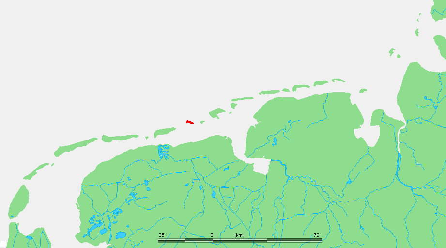 Wadden - Rottumerplaat.PNG